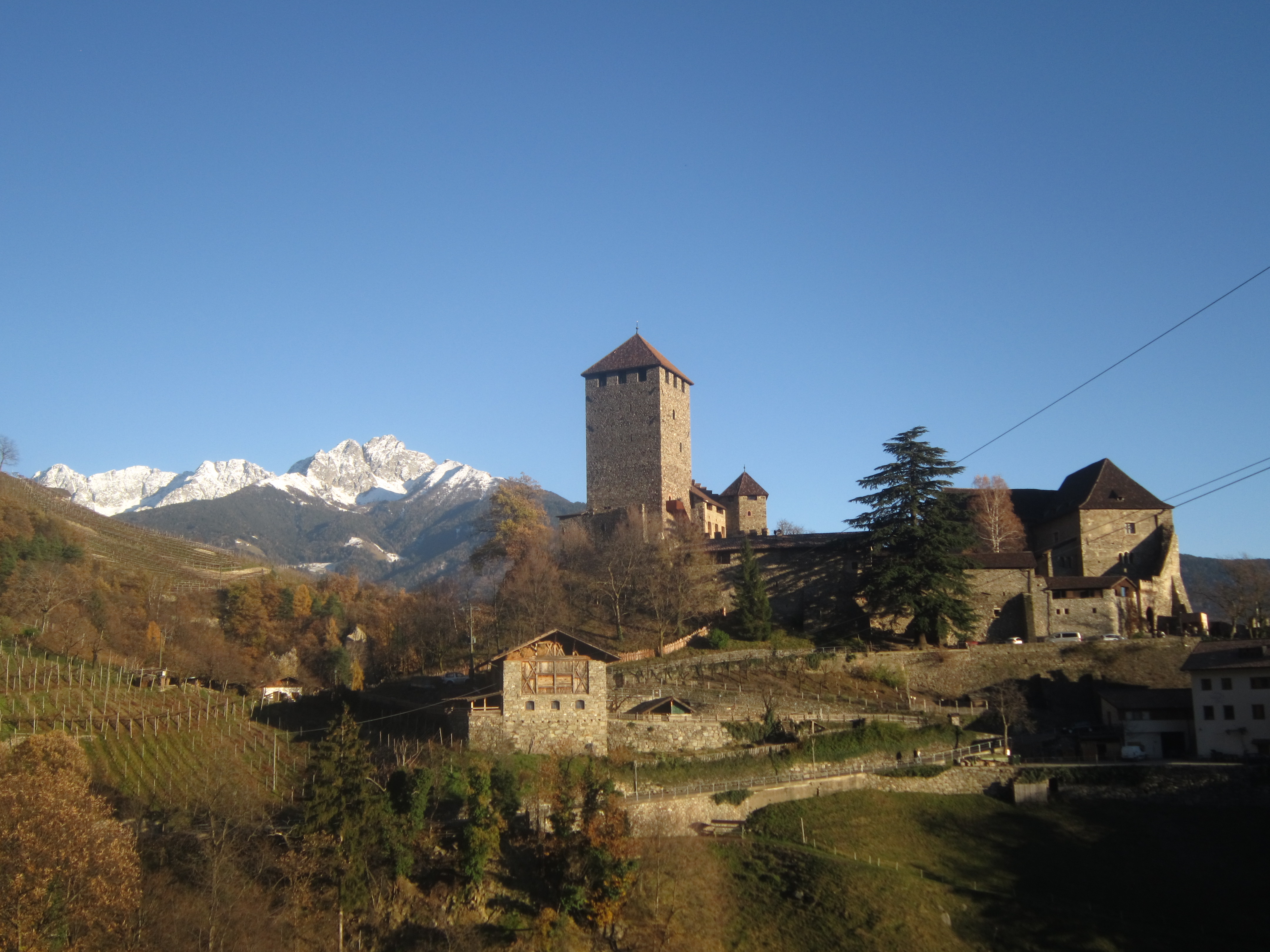 Kastelo Tirolo apud Merano (Sudtirolo)